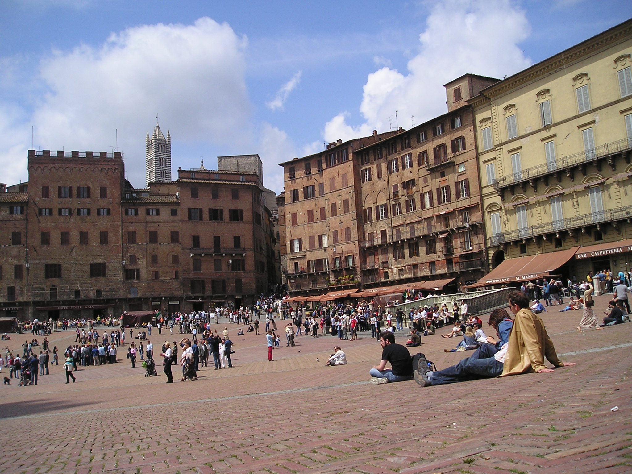 Piazza del Campo a Siena. autore Massimo Macconi